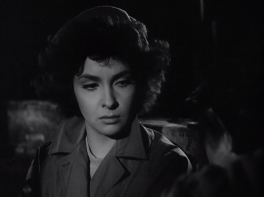 Screenshot dal film Achtung! Banditi! (1951)